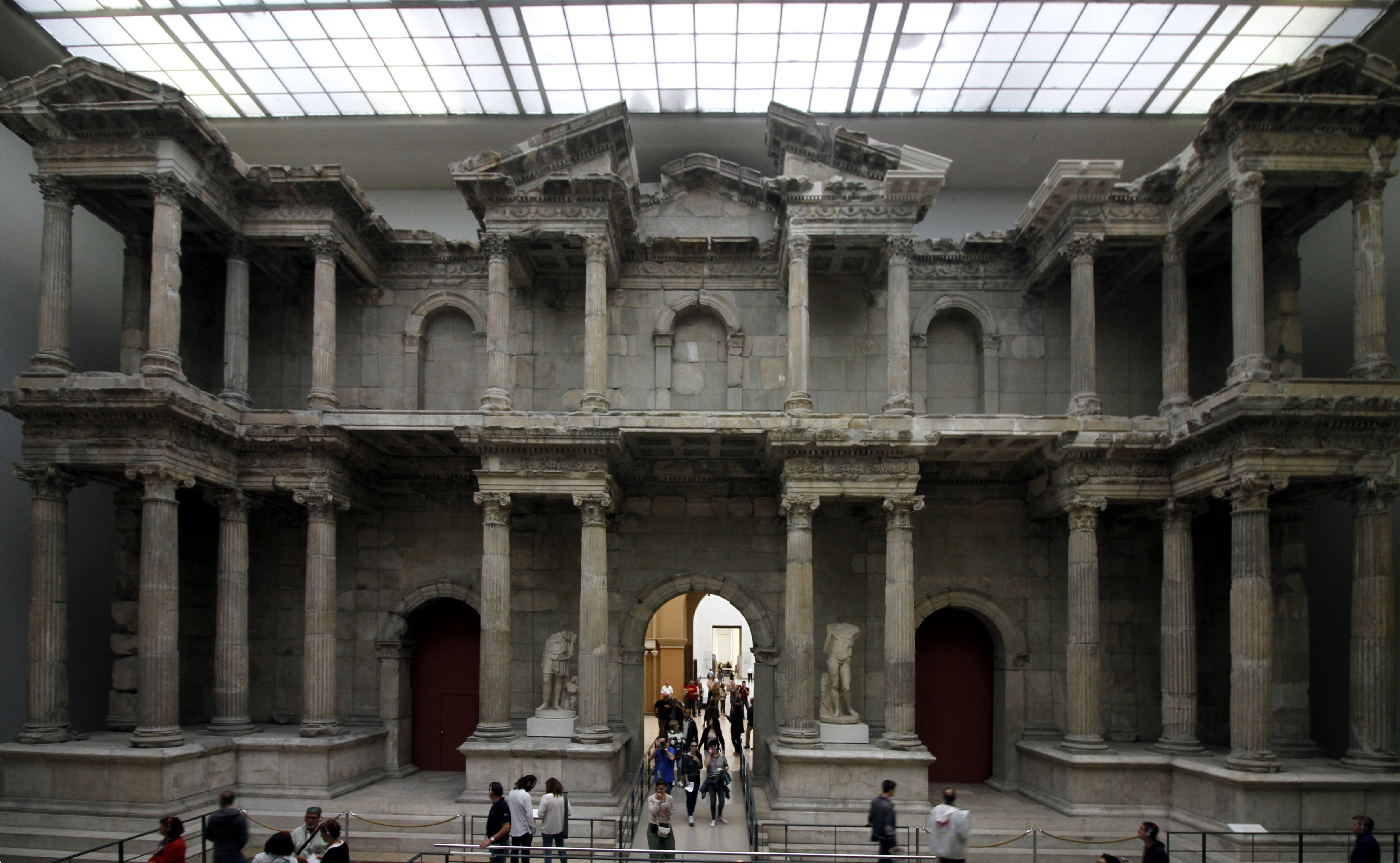 Antiquities from Miletus - Pergamonmuseum - Berlin - Germany